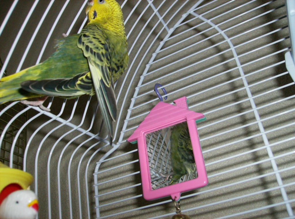 Licensieinfo: Foto zelf gemaakt, Naamsvermelding verplicht. Naamsvermelding als u het wilt kopieren: Calvintijd als naamsvermelding. Beschrijving: Grasparkiet Sweety met zijn speeltjes en kooi.